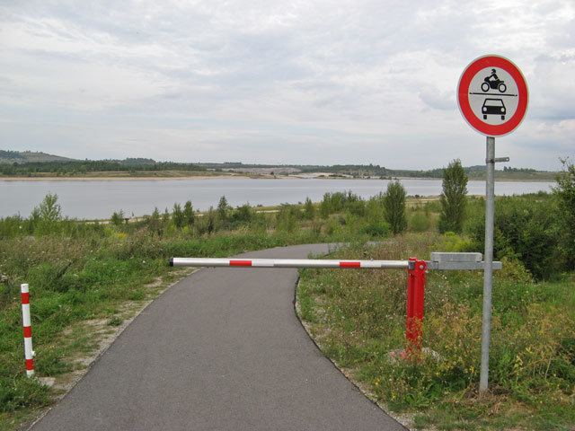 Radweg Geiseltalsee